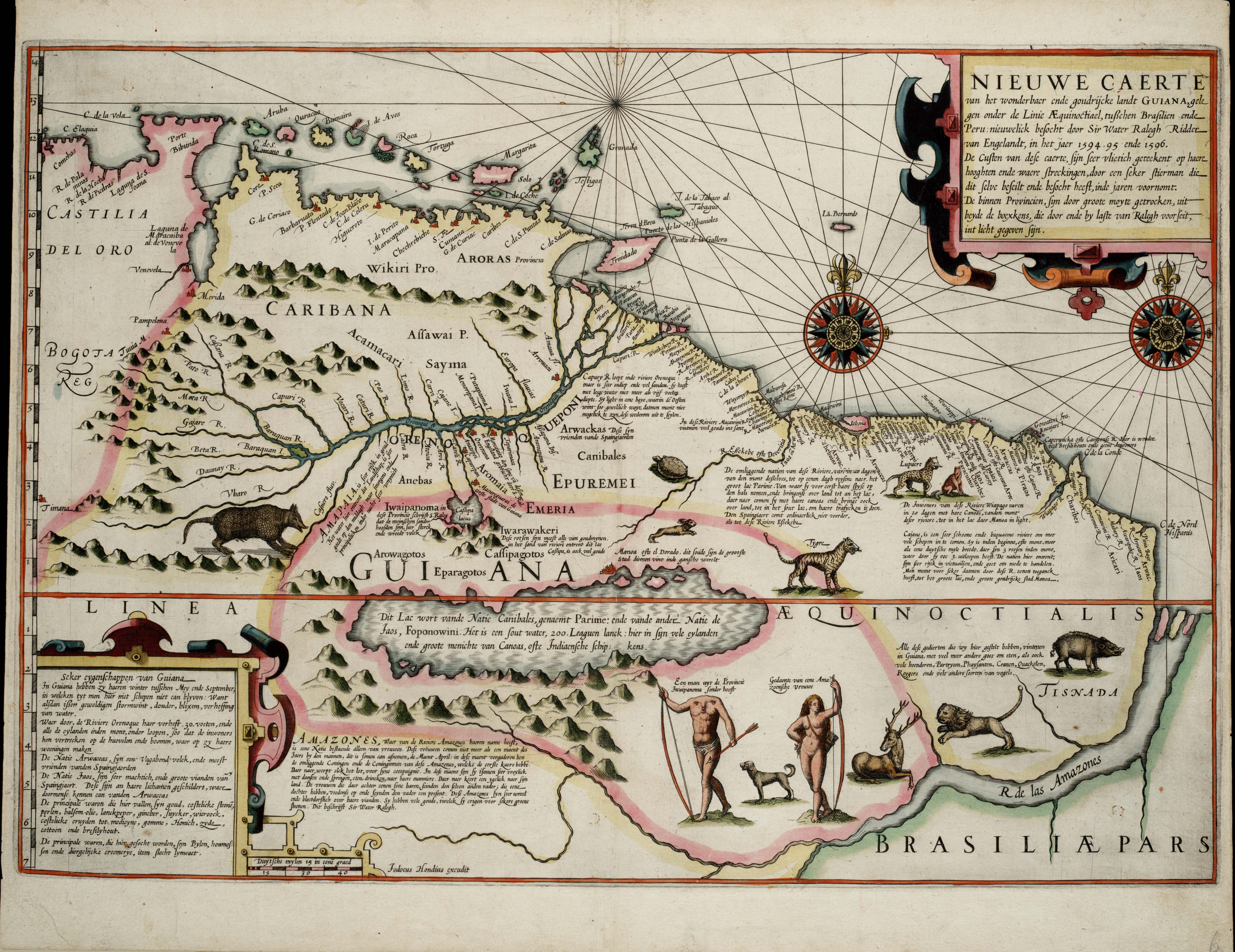 Title: Nieuwe caerte van het Wonderbaer ende Goudrjcke Landt Guiana Size: 36x52 cm